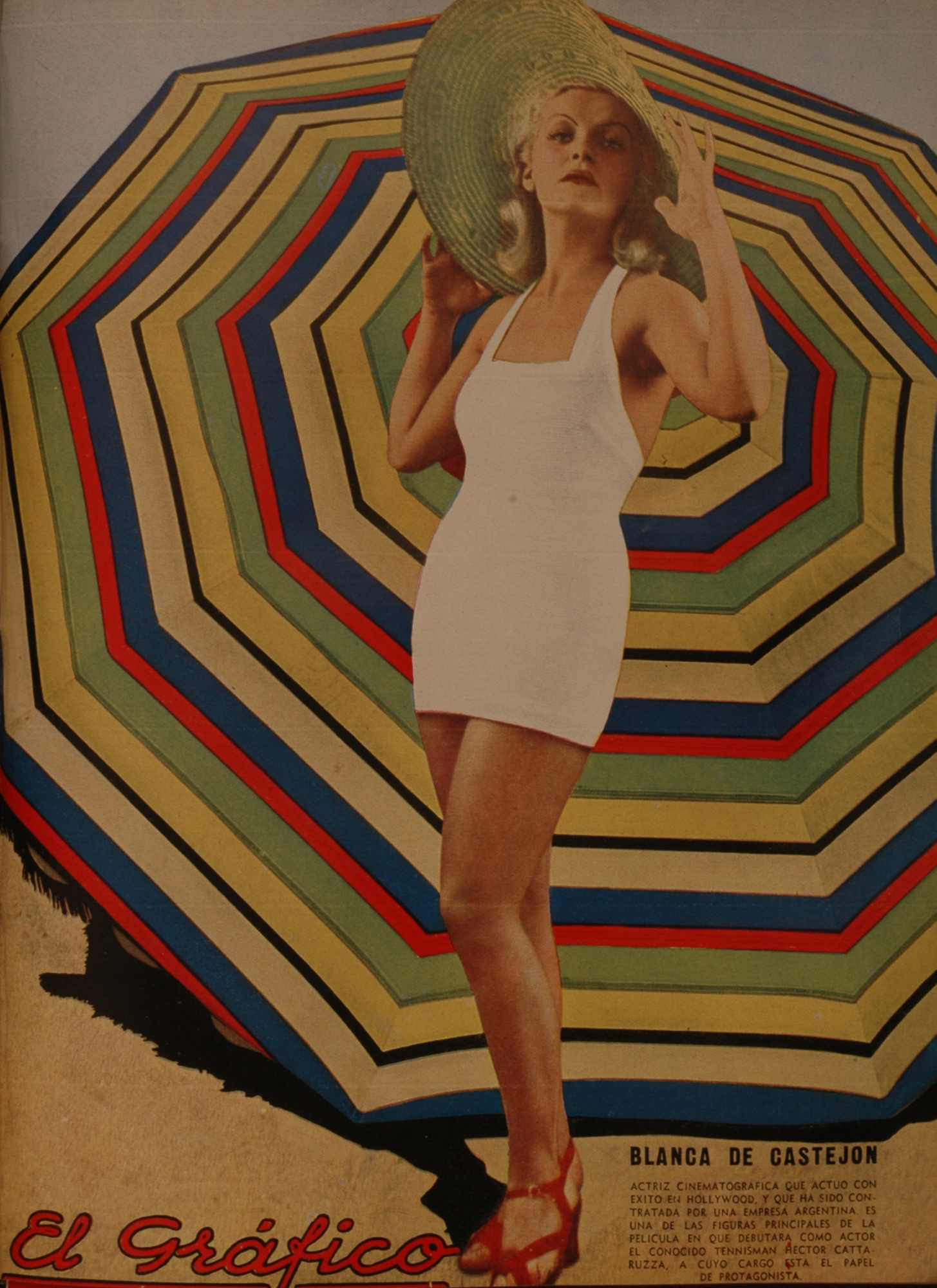 El Grafico del 19 de Enero de 1935. Edicion 810